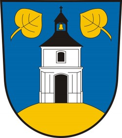 Drahňovice